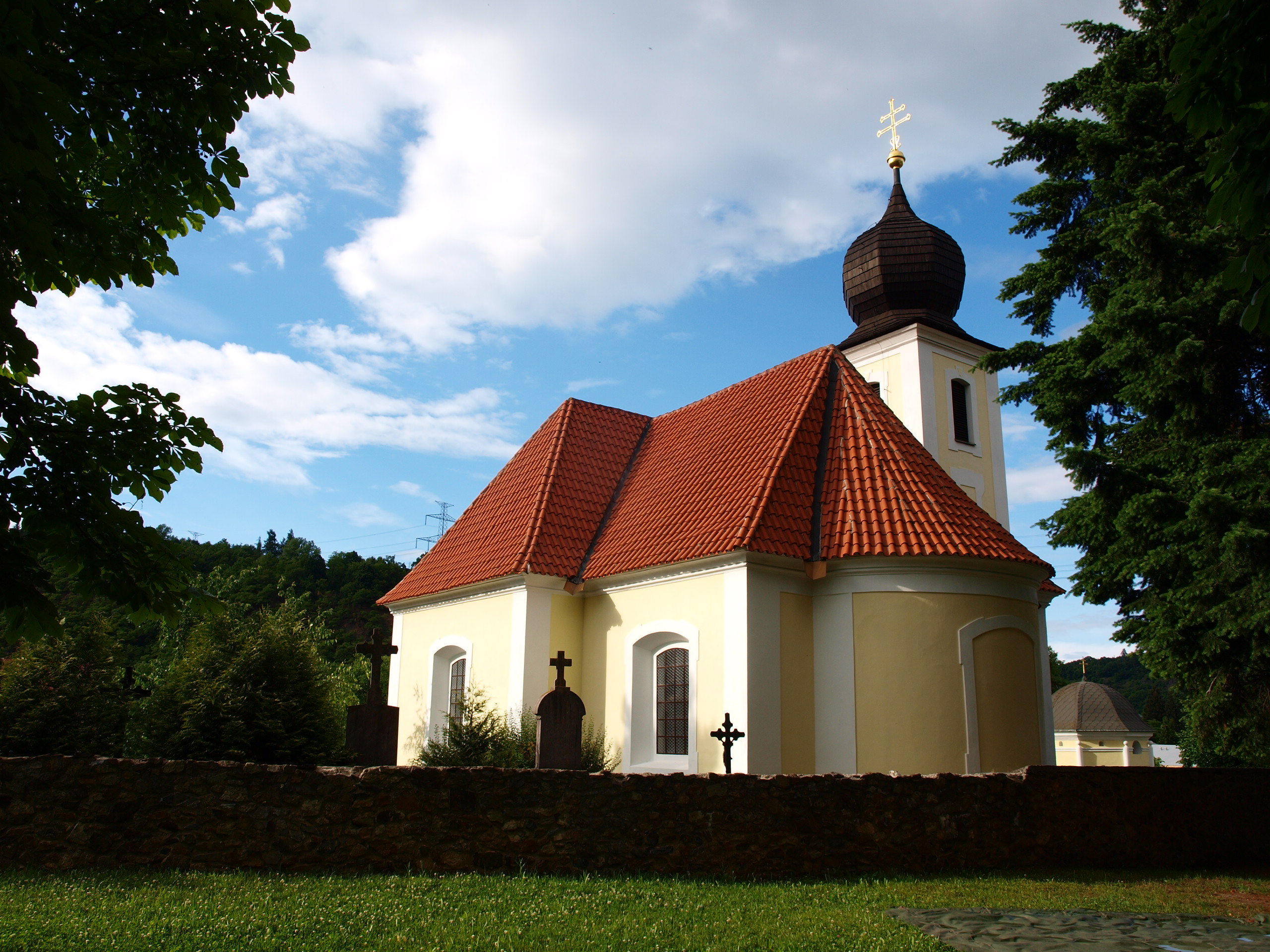 Vrané nad Vltavou - kostel sv. Jiří